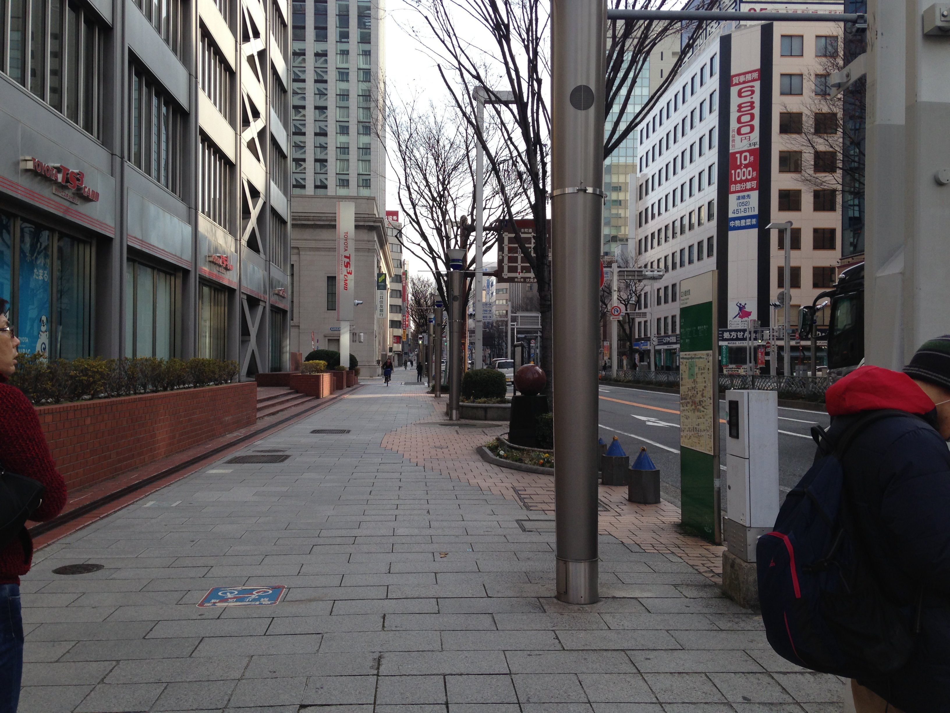 広小路伏見交差点より望む広小路通(東側)